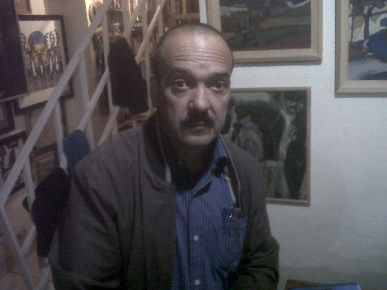 Pintor mexicano reconocido internaiconalmente